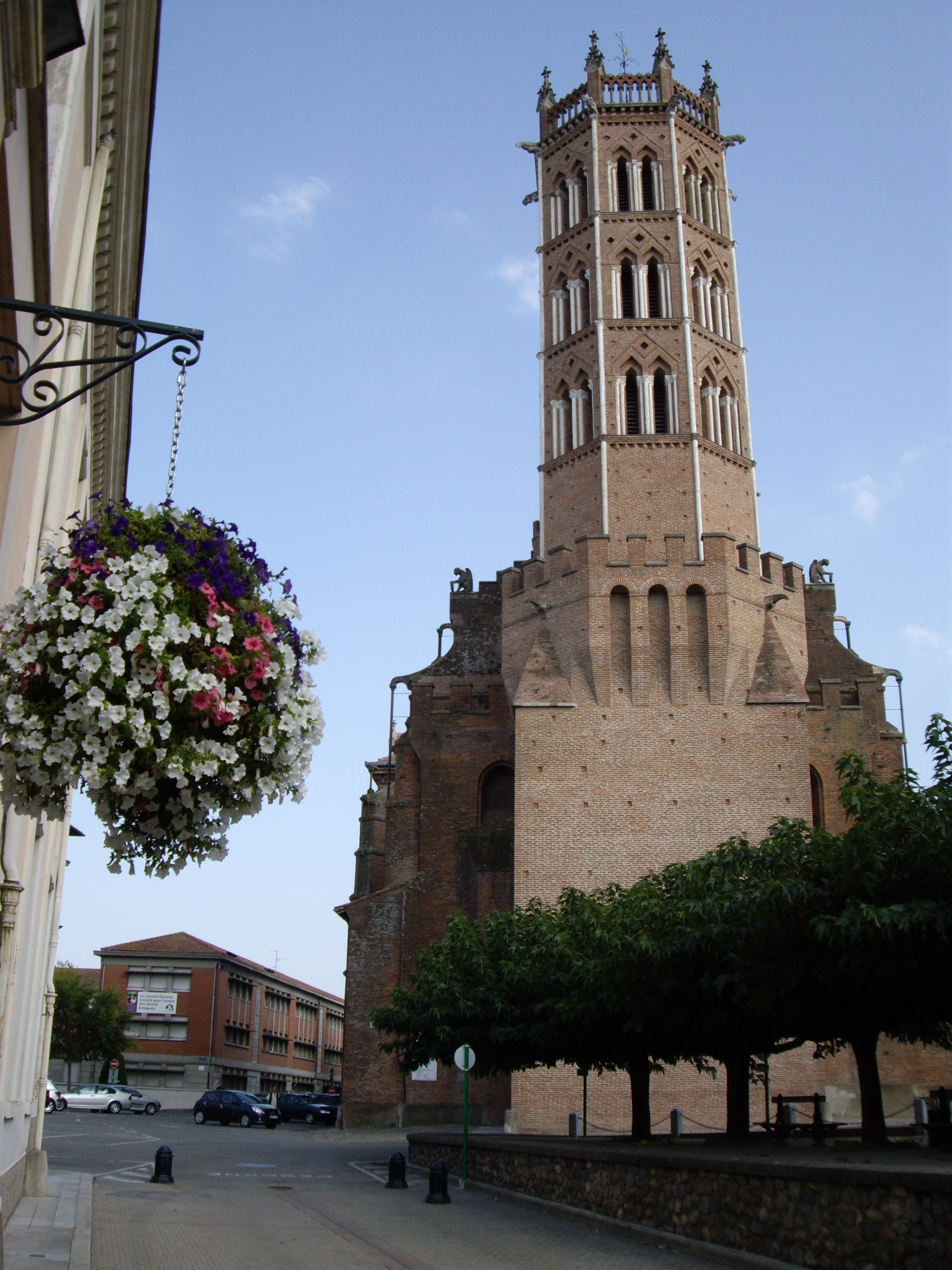 Cathédrale Saint-Antonin de Pamiers (Ariège, France).